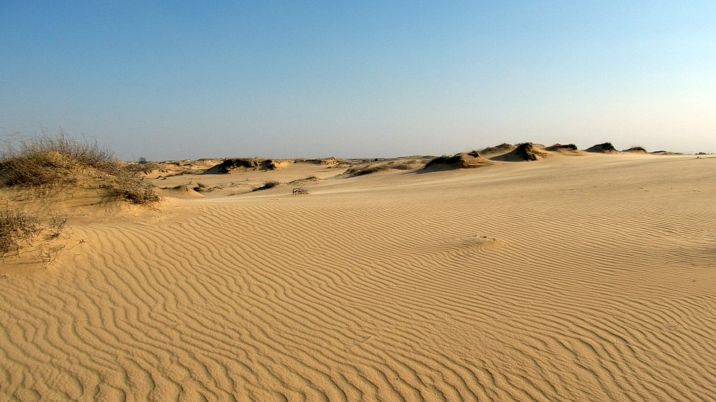 Херсонська область, Національний природний парк Олешківські піски. Автор Гаврилюк С. В. (5)